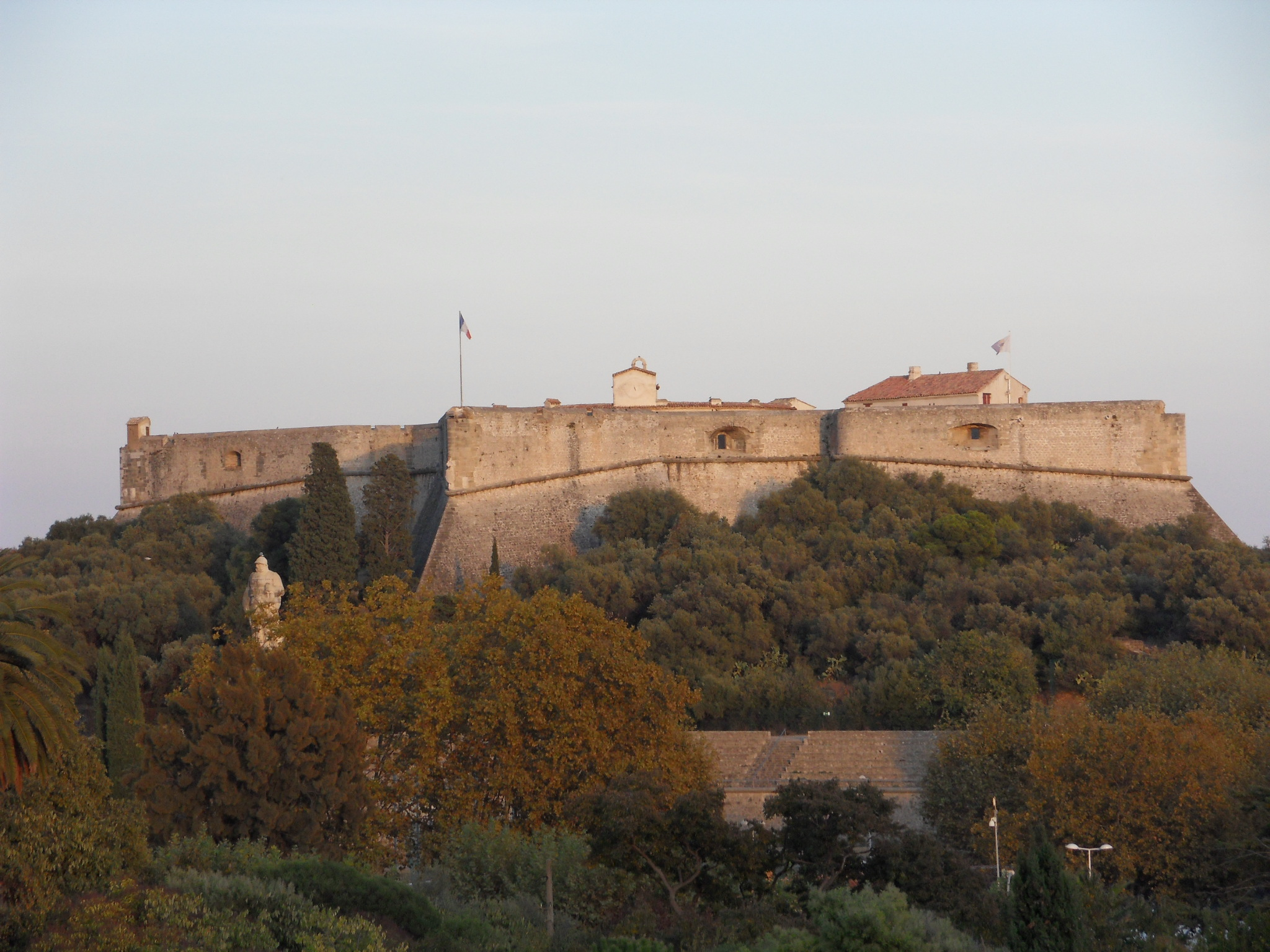 Fort carré, Antibes (France)